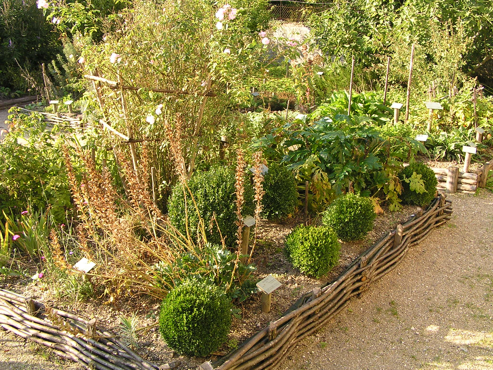 jardin médiéval en bas de l'église à Dignac